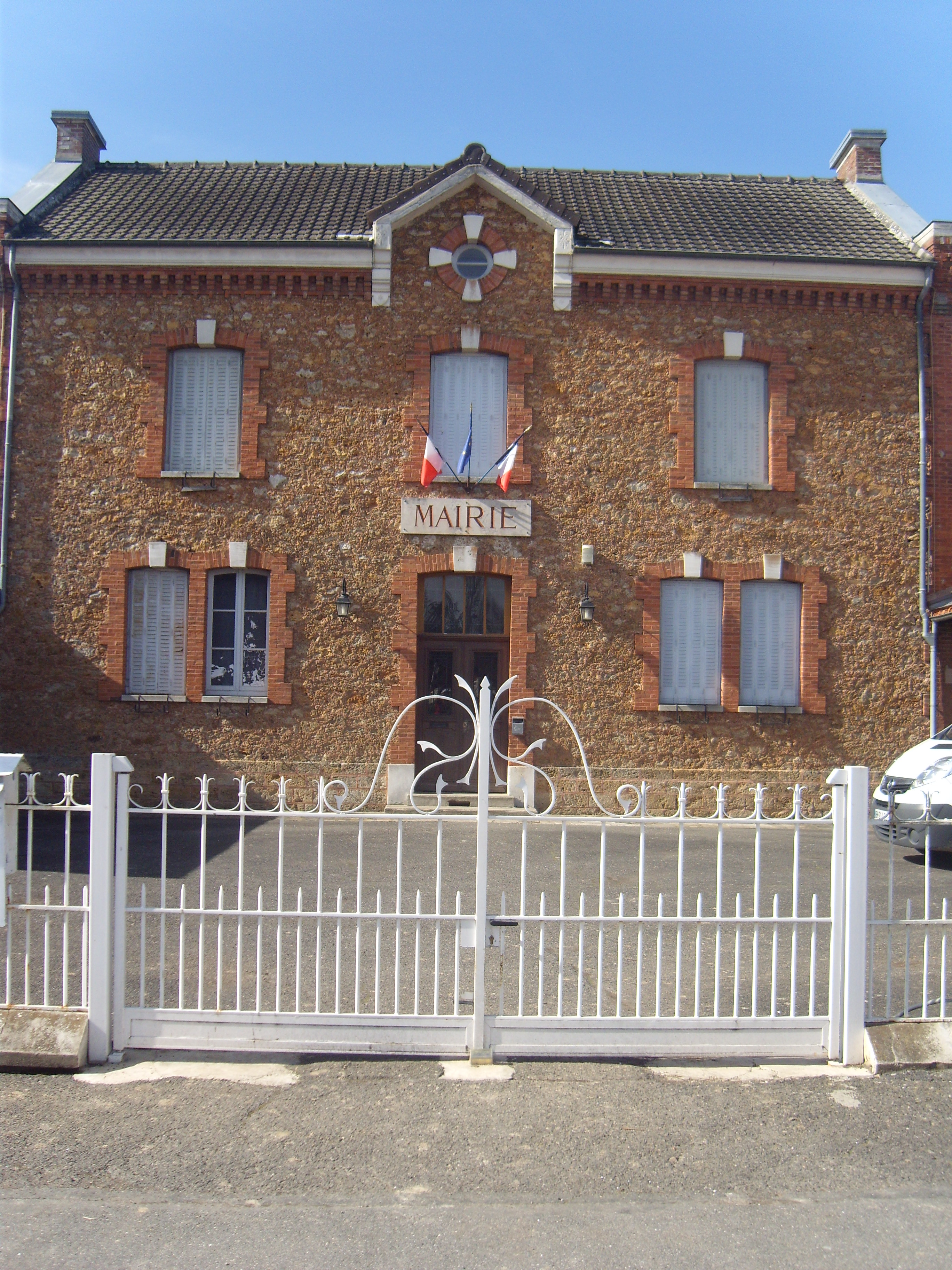 Mairie de Châtres